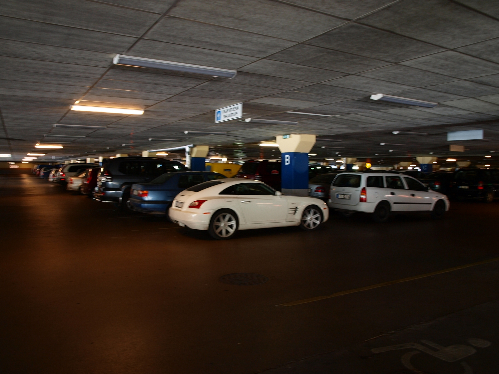 apakszemes stavvieta